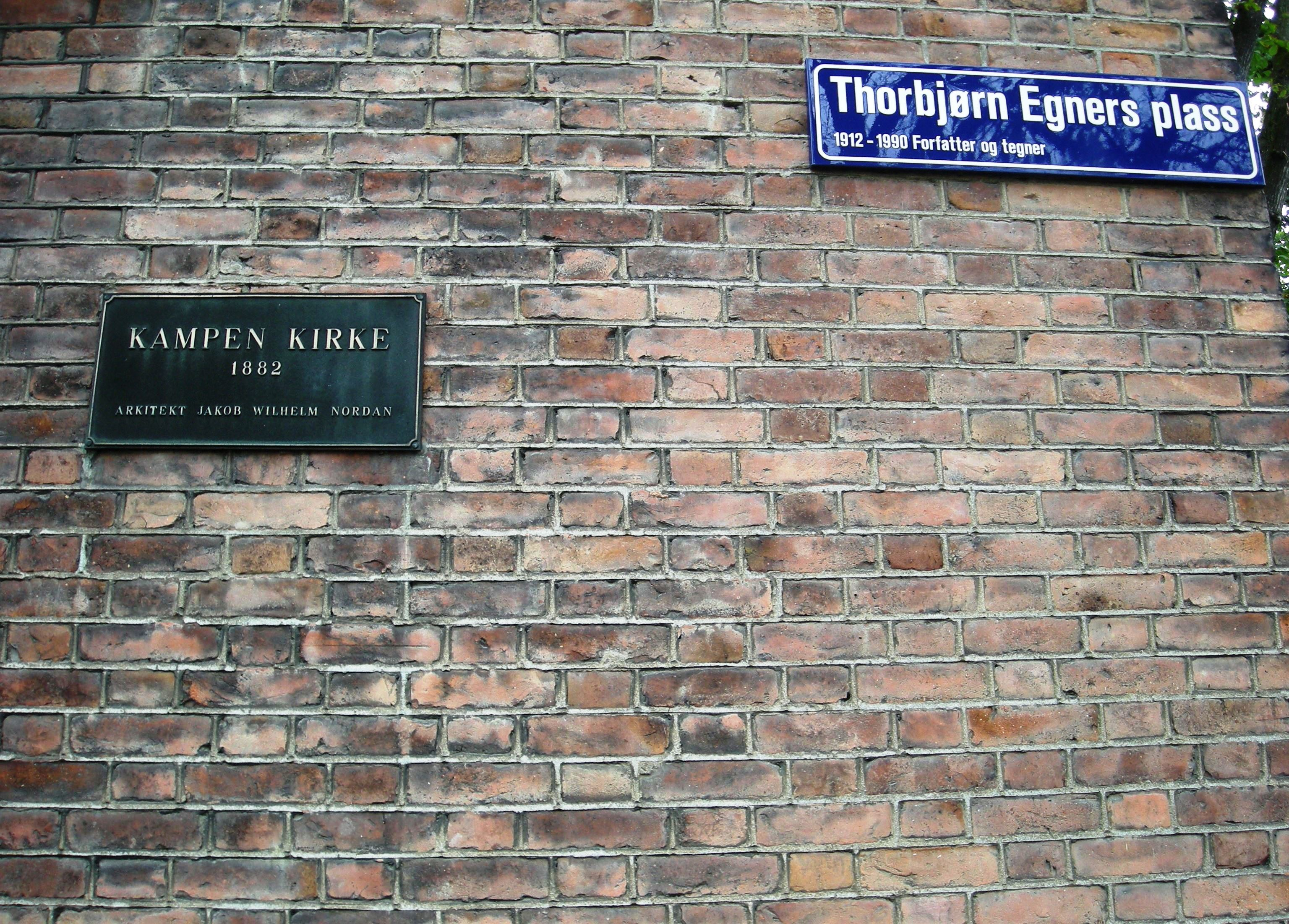 Et skilt på kirkeveggen kunngjør at Thorbjørn Egners plass ligger foran Kampen kirke.